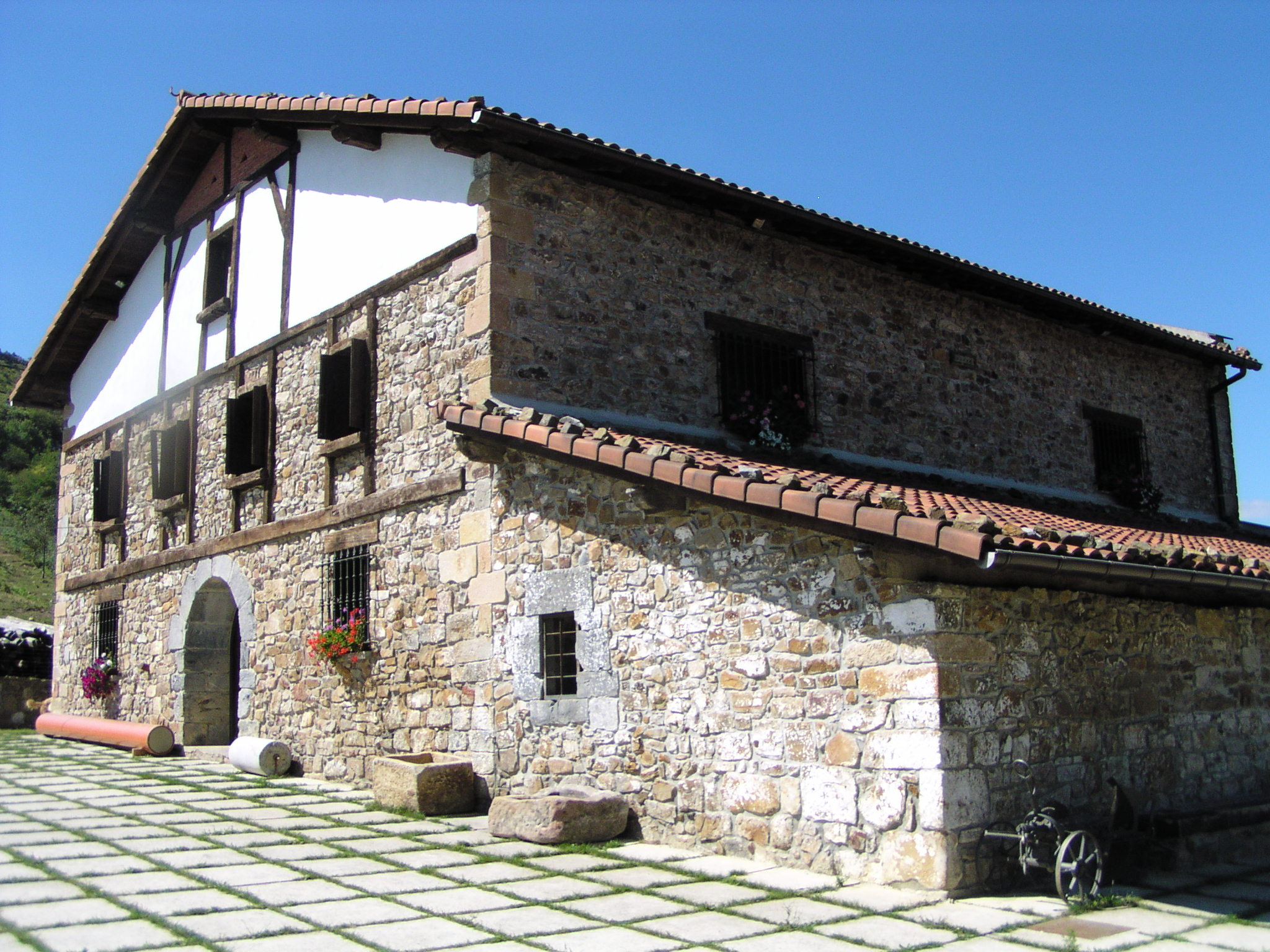 Zizurkilgo Zarateko Benta, Mendibailaran